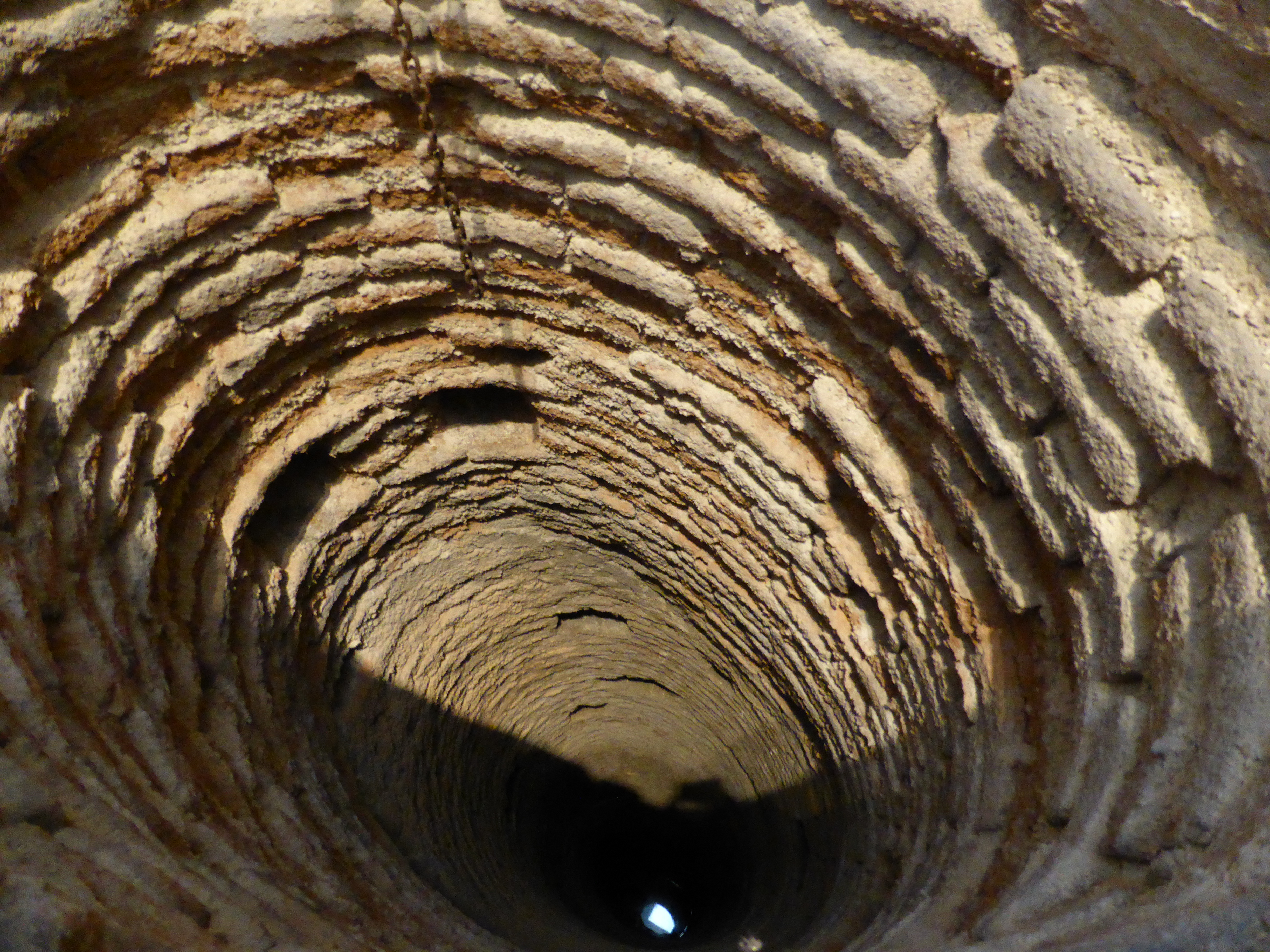 En el Museo de San Isidro, de Madrid (España), se conserva el antiguo pozo donde -según la tradición- ocurrió el milagro del salvamento del hijo del santo, que había caído al fondo del pozo. El milagro del pozo debe situarse en el siglo XII, que corresponde a la época adulta de San Isidro Labrador (Ysidorus Agricola, según el Códice de San Isidro).